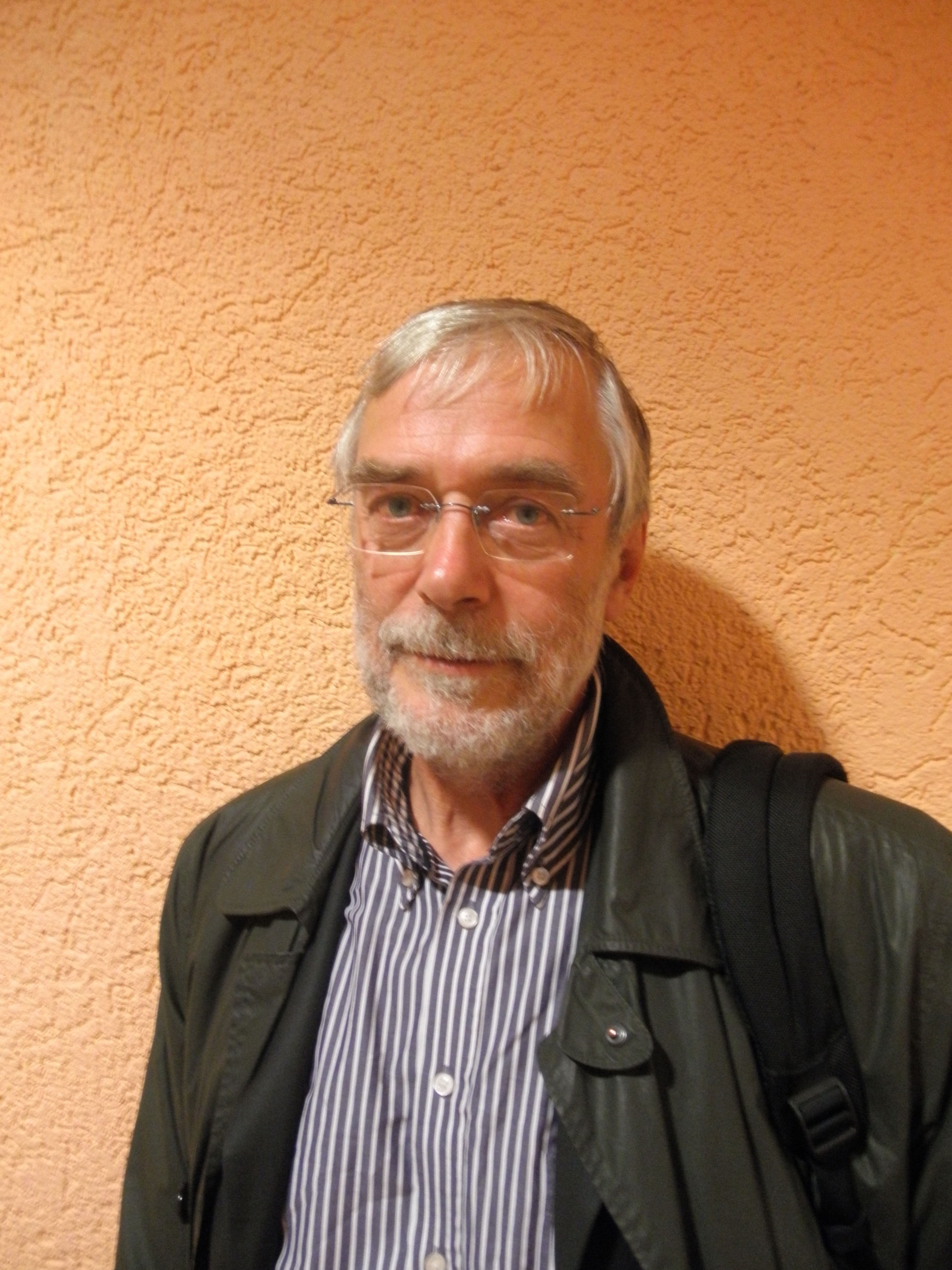 la neŭrobiologo Gerald Hüther en novembro 2011 kadre de psikoterapiista kongreso en Bad Lauterberg, Germanio